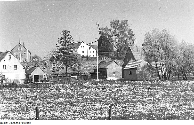 Original image description from the Deutsche Fotothek Großhennersdorf-Neundorf. Windmühlengehöft